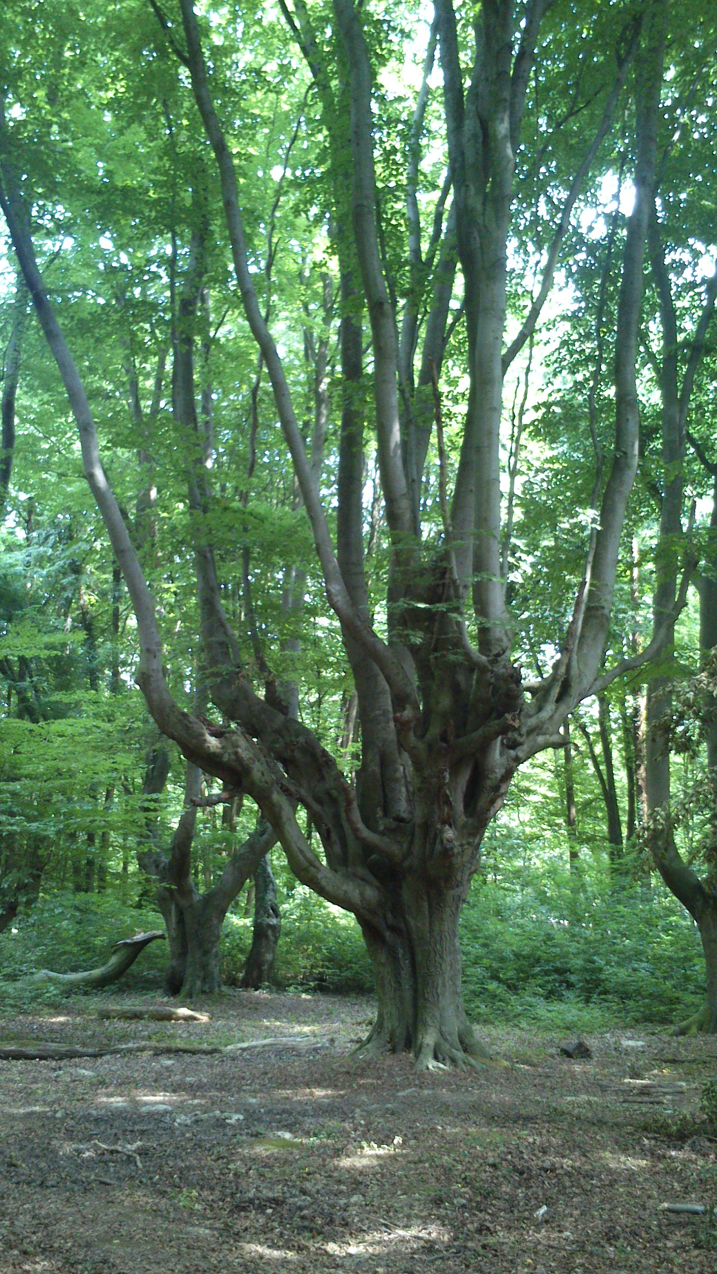 Kopfbuche im Kottenforst (Bonn)